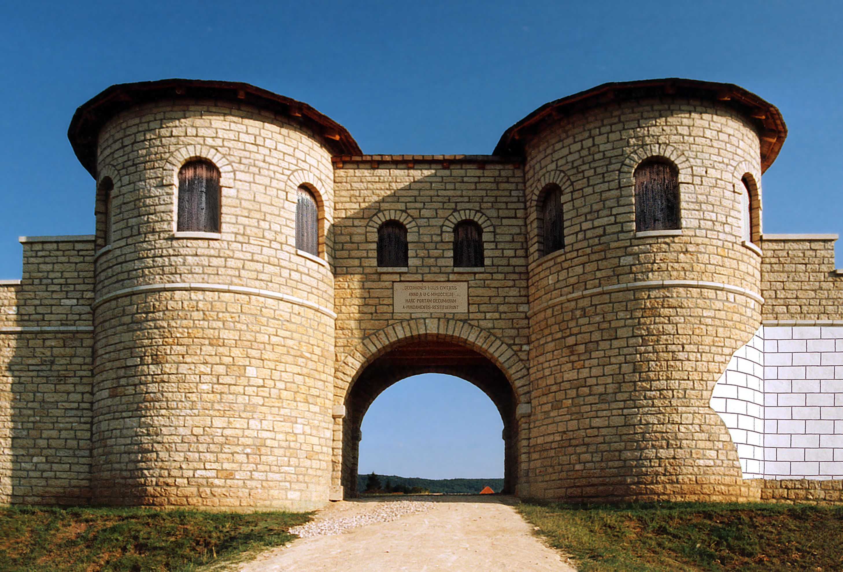 Die Porta decumana des Kastells Weißenburg, Bayern. Rekonstruiert 1990. Zustand am 15. September 1999.